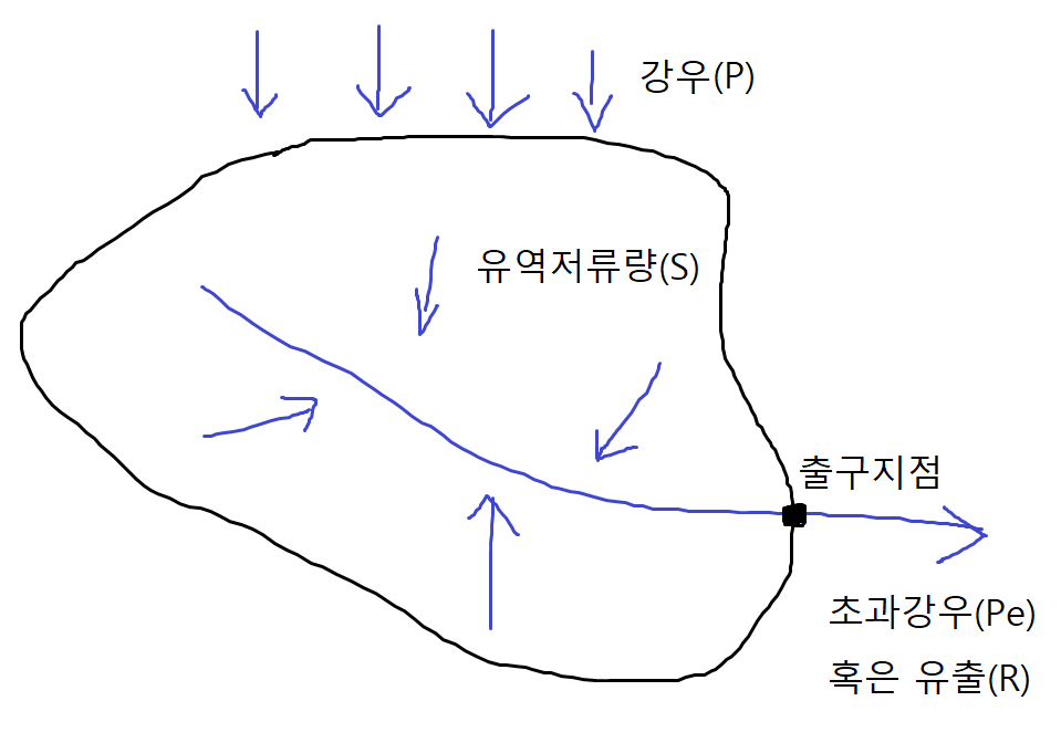 물수지 설명도